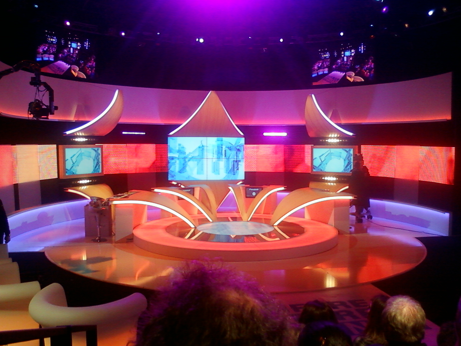 Le plateau de l'émission spéciale "40 ans" des Chiffres et des lettres diffusée le lundi 19 mars 2012 sur France 3 (studio 130 de la Plaine-Saint-Denis)